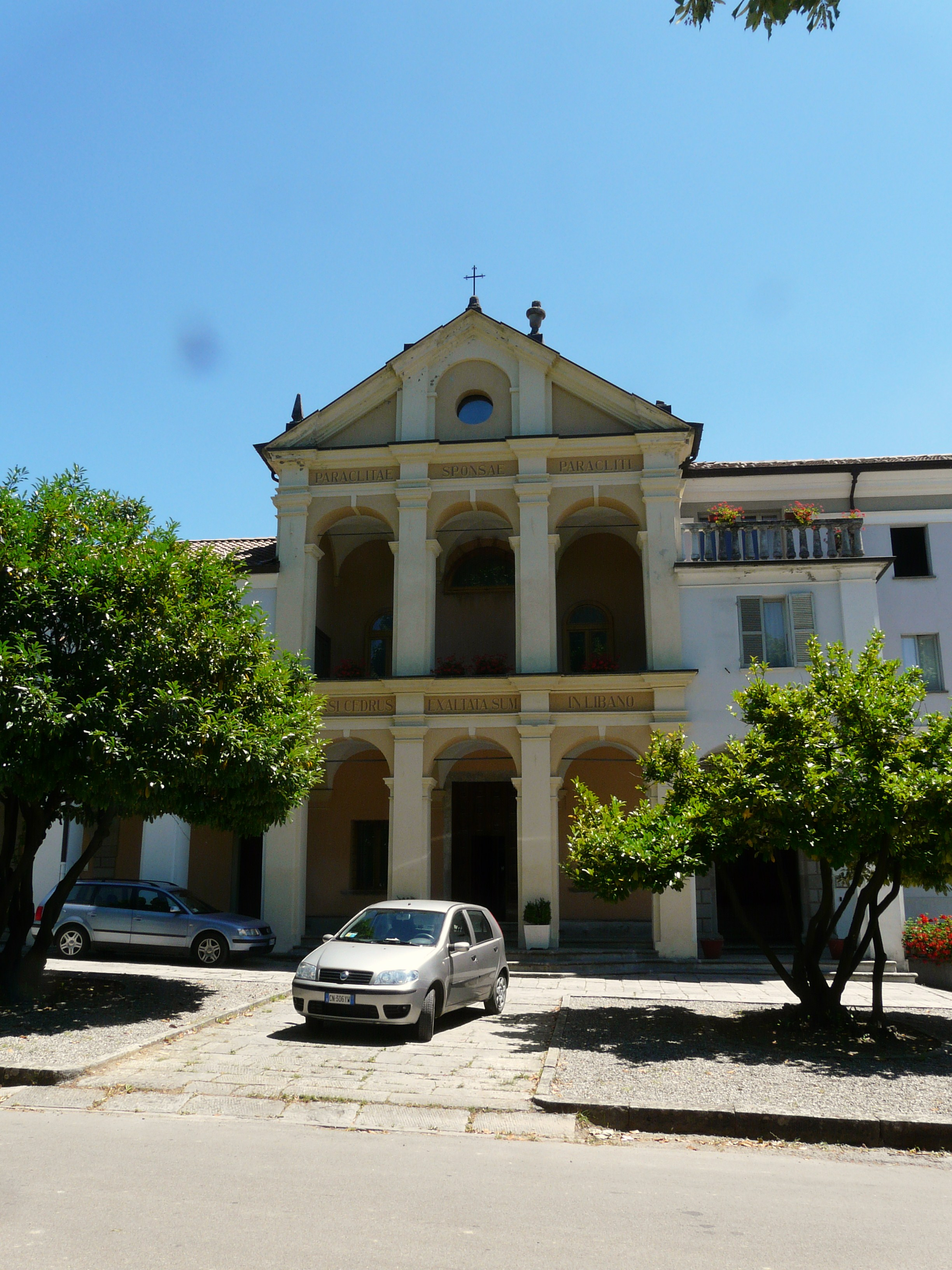 Immagini varie del santuario della Madonna di San Marco, Bedonia, Emilia Romagna, Italia